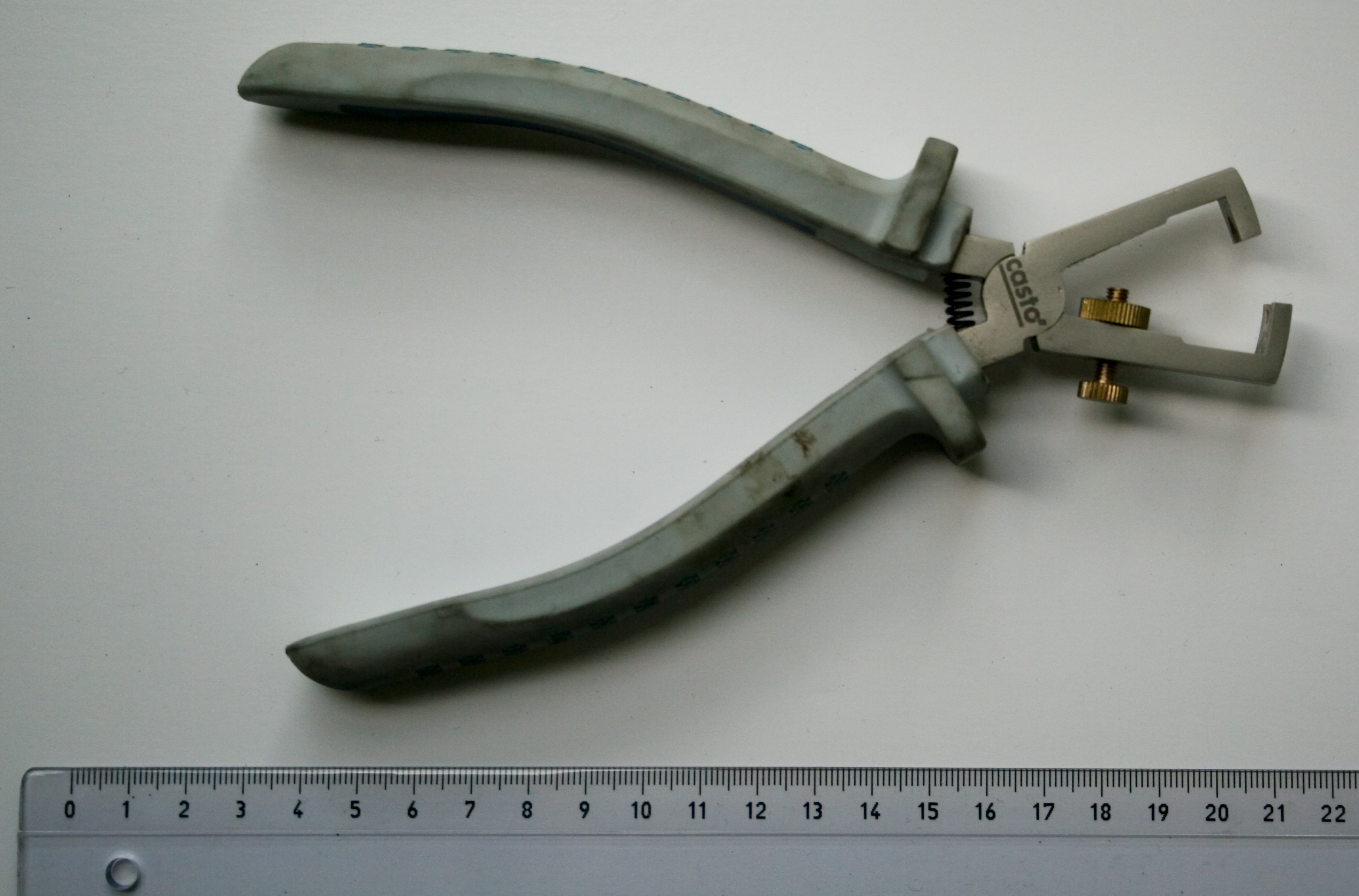 Pince à dénuder